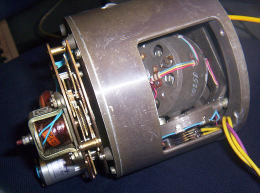 Innerer Teil einer Kreiselkompass-Plattform eines Flugzeuges (Sowjetunion ca. 1969)